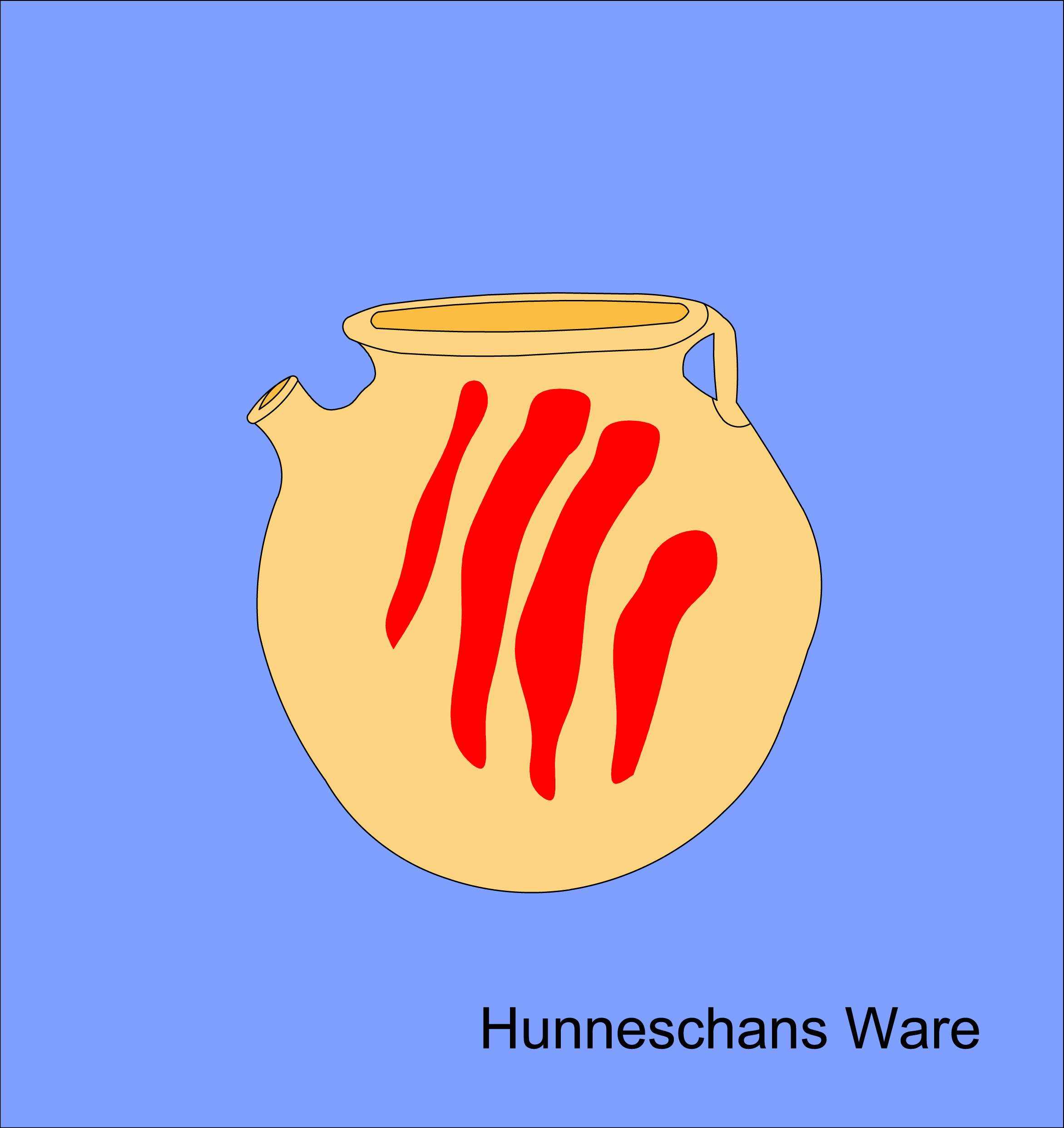 Idealtypische Umzeichnung eines Hunneschans-Gefäßes (9.Jh.).